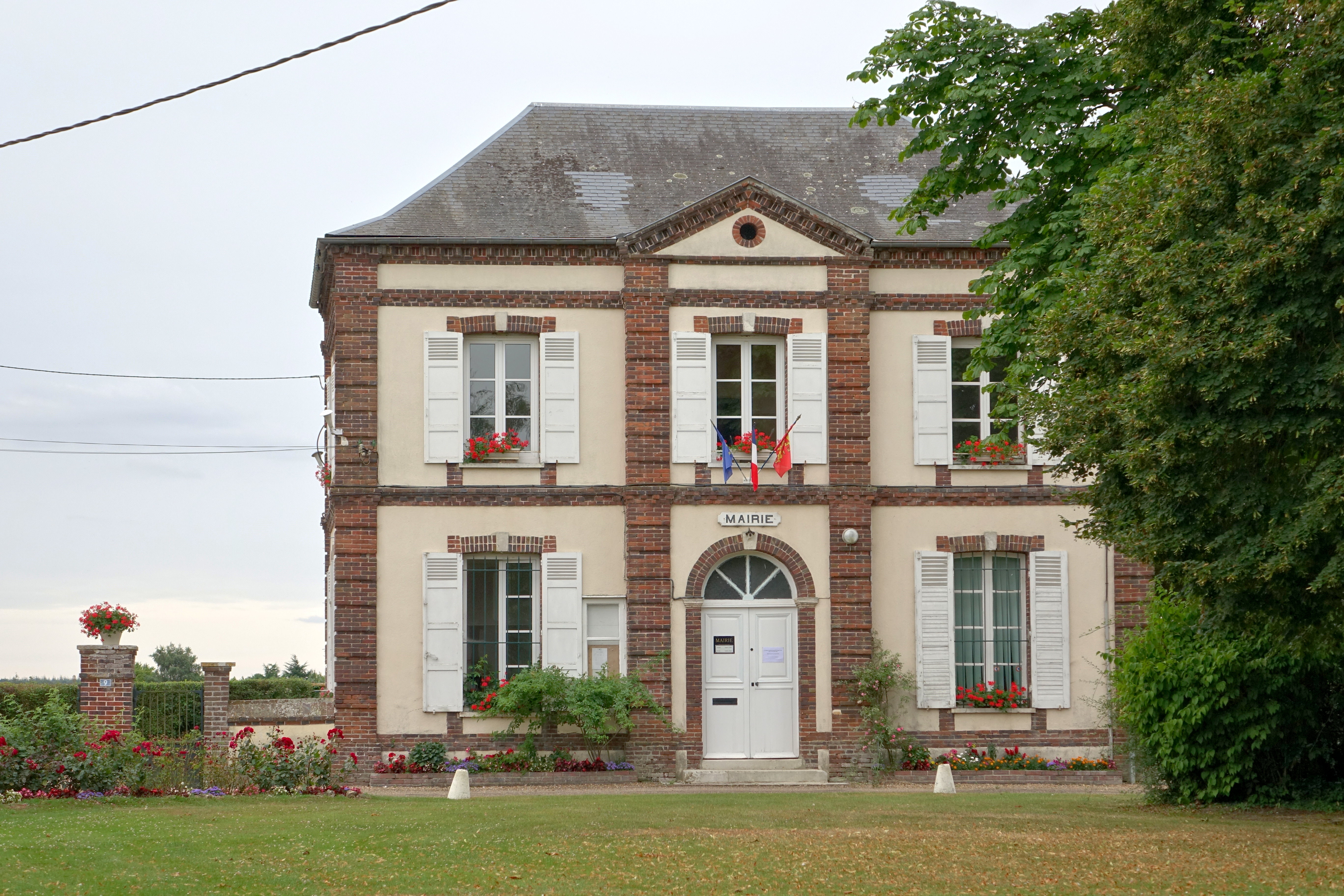 Mairie de Beaubray, Eure, France